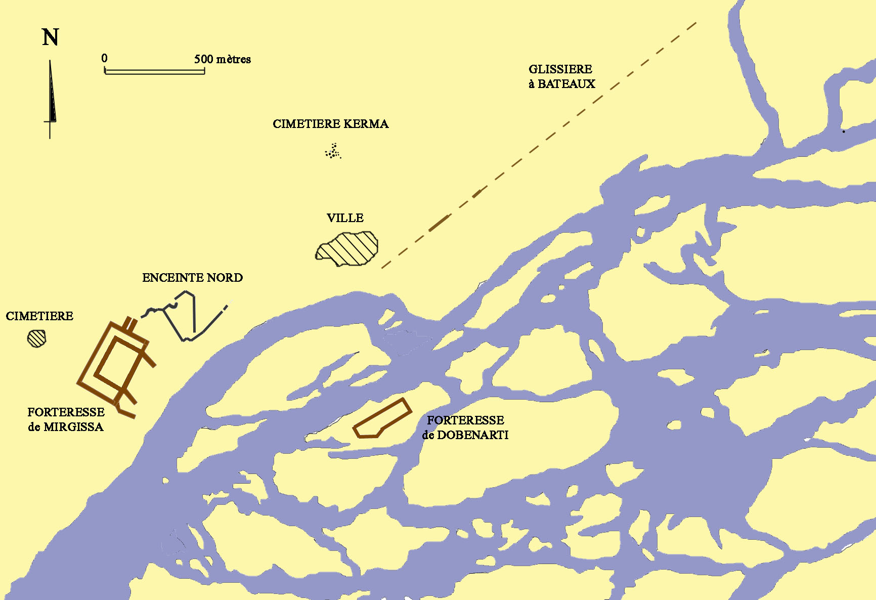 Plan du site de Mirgissa